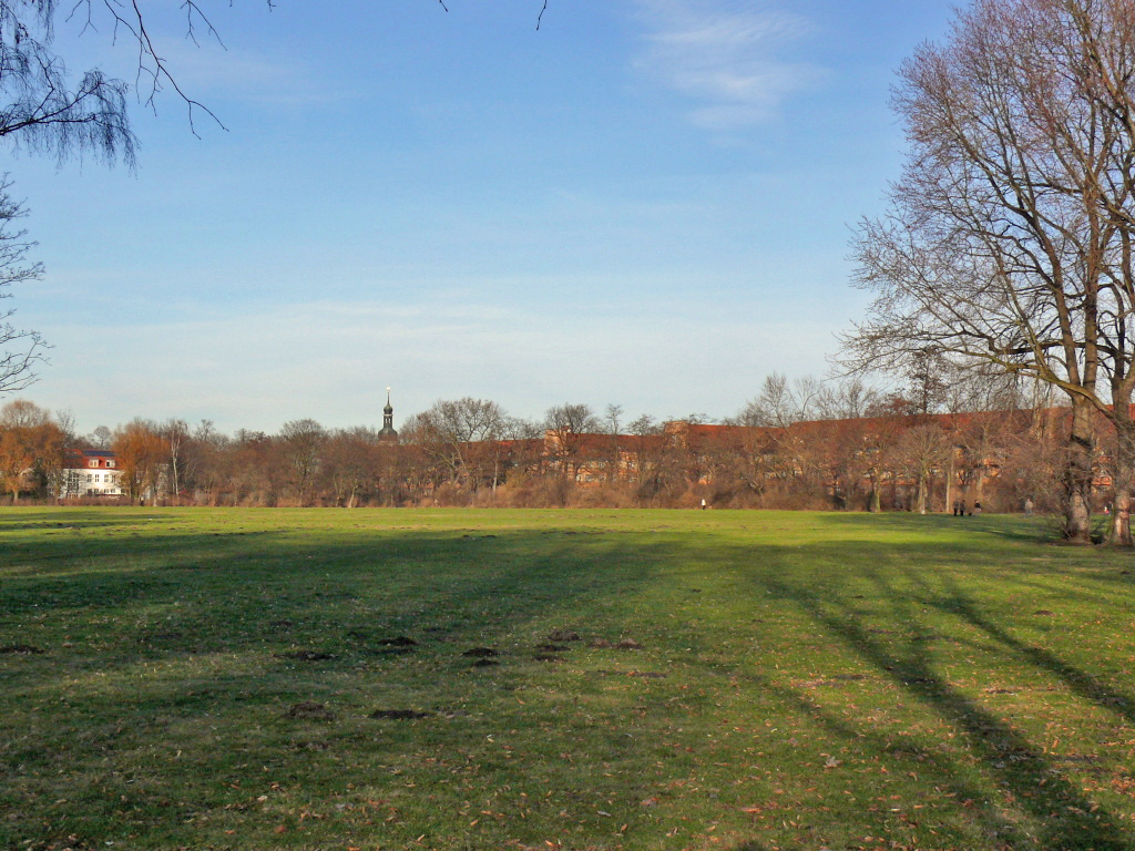 Spiel- und Liegewiesen im Mariannenpark Leipzig-Schönefeld. Im Hintergrund ist der Kirchturm von Schönefeld sichtbar. Links im Bild das 1954 errichtete Kindergartengebäude.